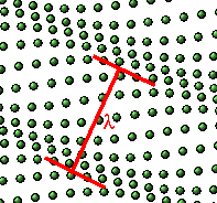 Onde de vibration se propageant dans un réseau cristallin (l'amplitude est exagérée) Image crée par